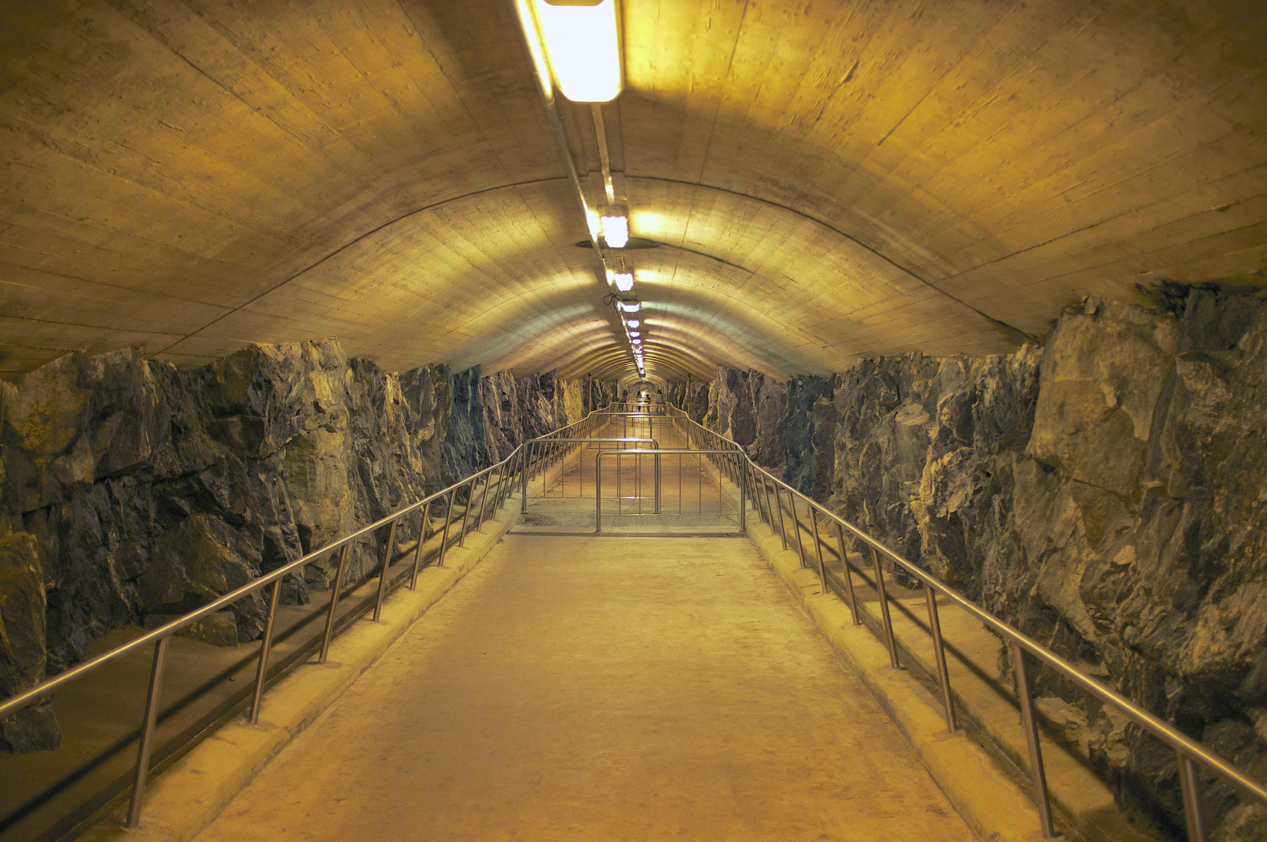 Ellingsrudåsen stasjon på Furusetbanen i Oslo.